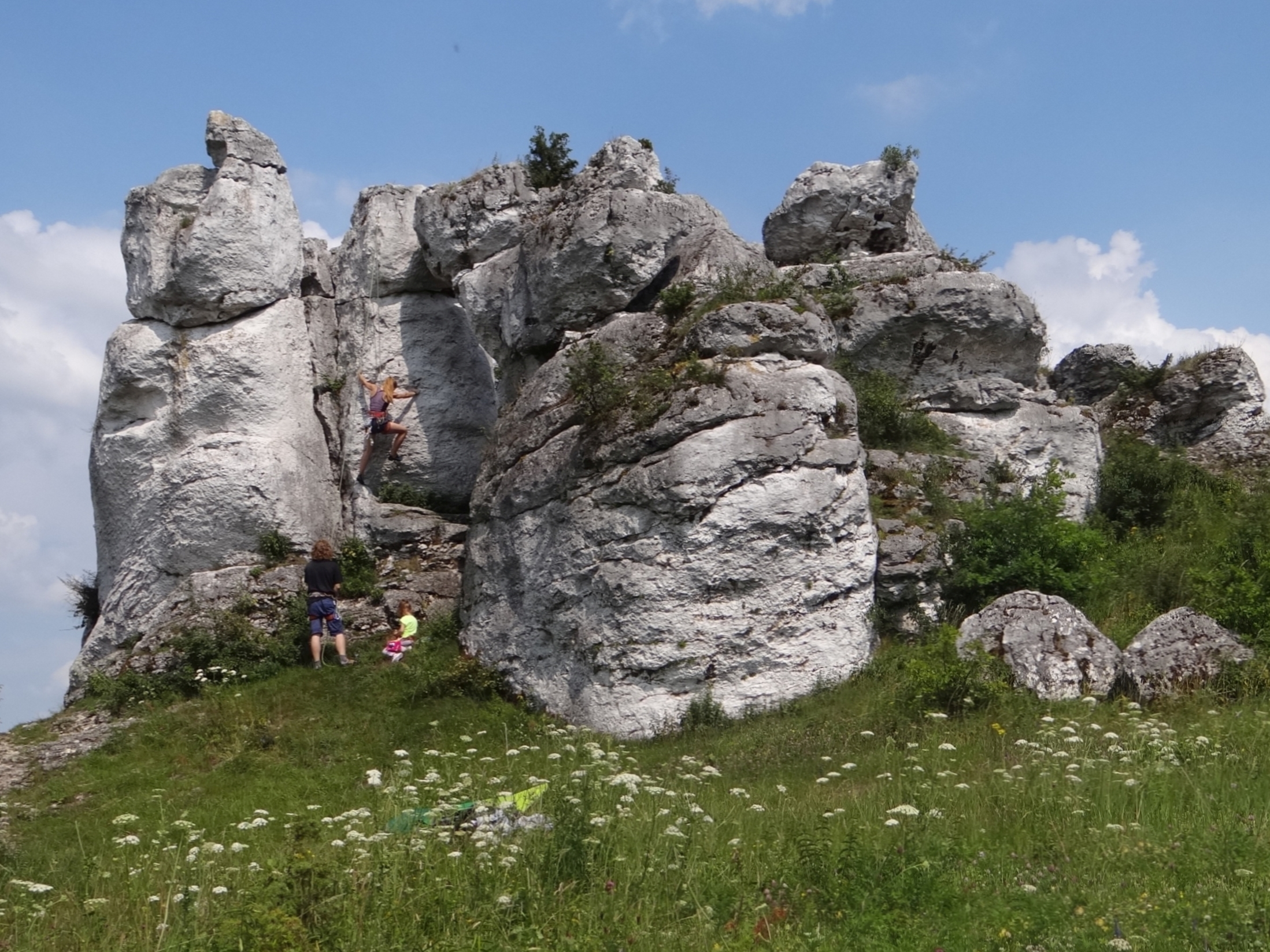 Góry Towarne Małe. Skała Bałwanek